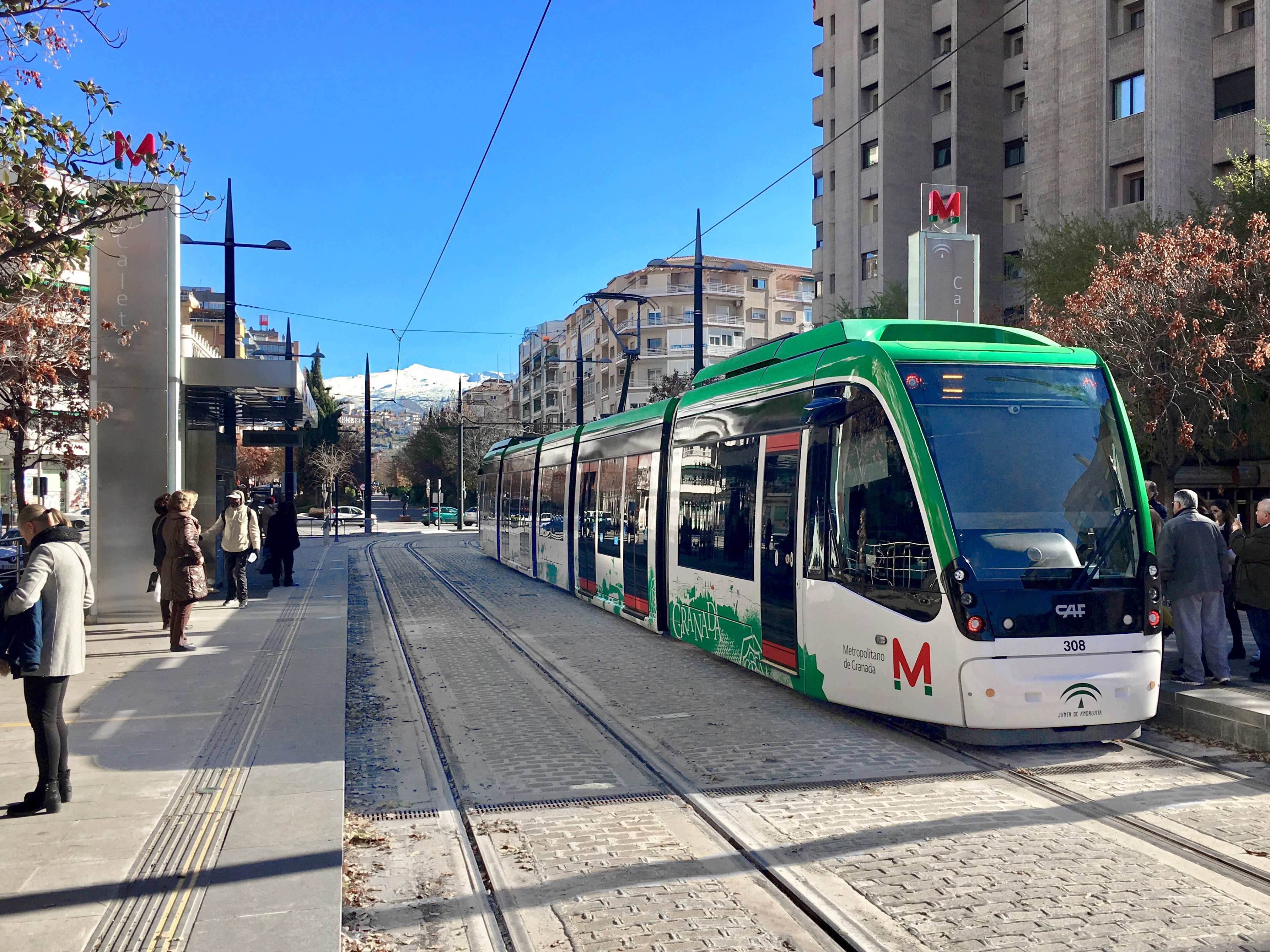 Estación de Caleta del Metro de Granada. Al fondo se aprecia el pico de Veleta de Sierra Nevada.